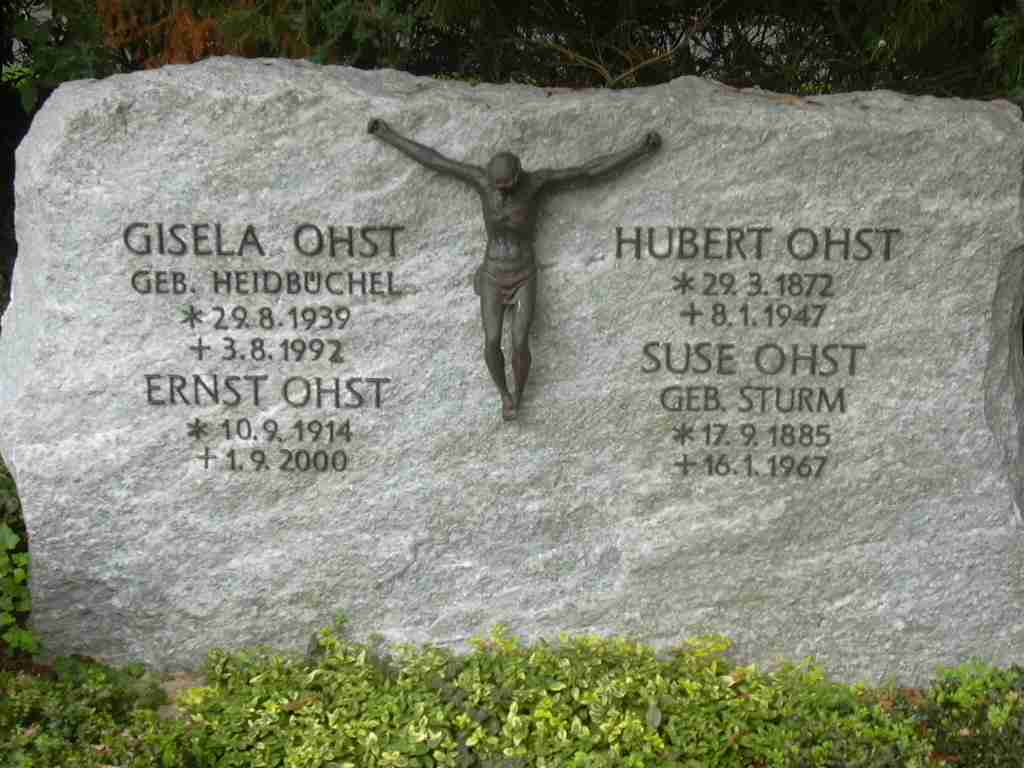 Grabstein Ernst Ohst, Düren own work papa1234 2006-10-10